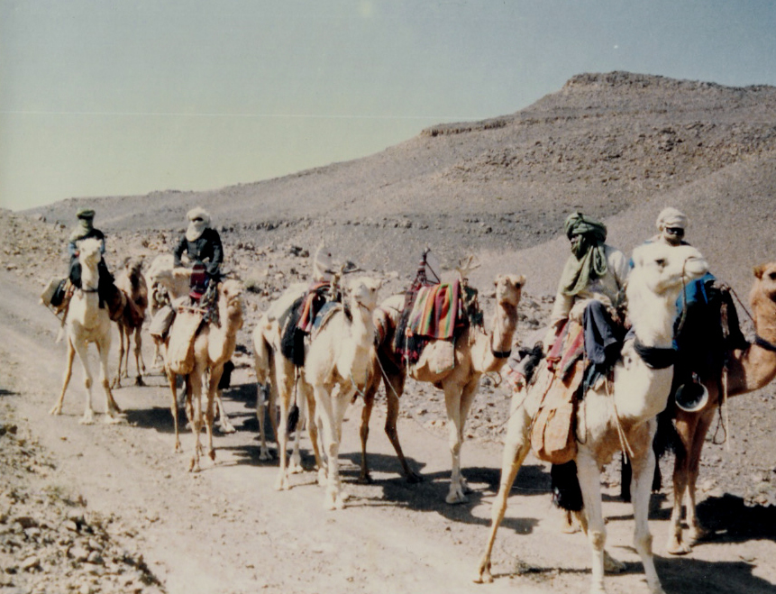 caravane dans le Sahara algérien